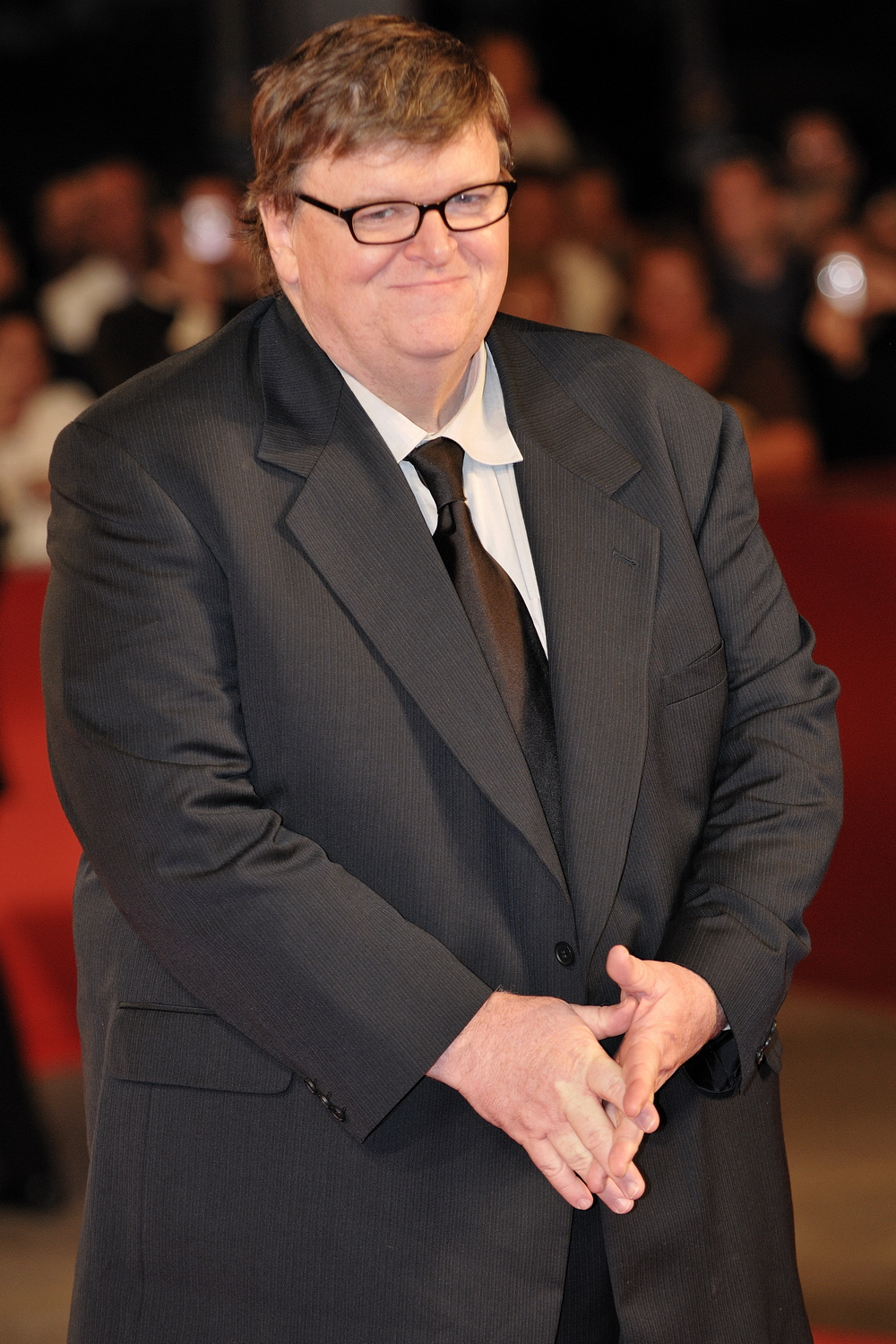 66ème Festival du Cinéma de Venise (Mostra), 5ème jour (06/09/2009) Tapis Rouge avec Michael Moore pour son film en compétition : Capitalism, Love Story